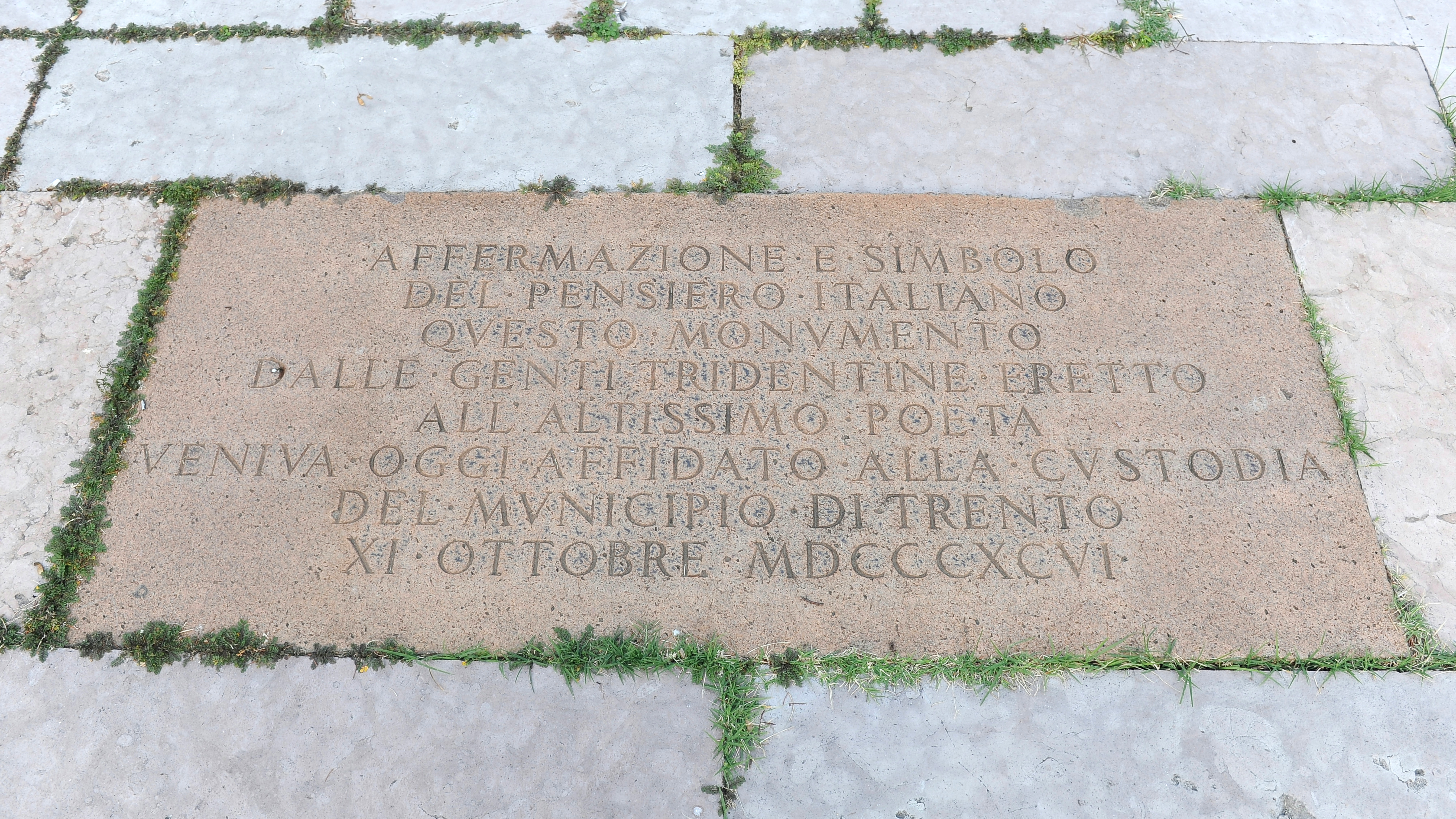 Monumento a Dante Alighieri This is a photo of a monument which is part of cultural heritage of Italy.